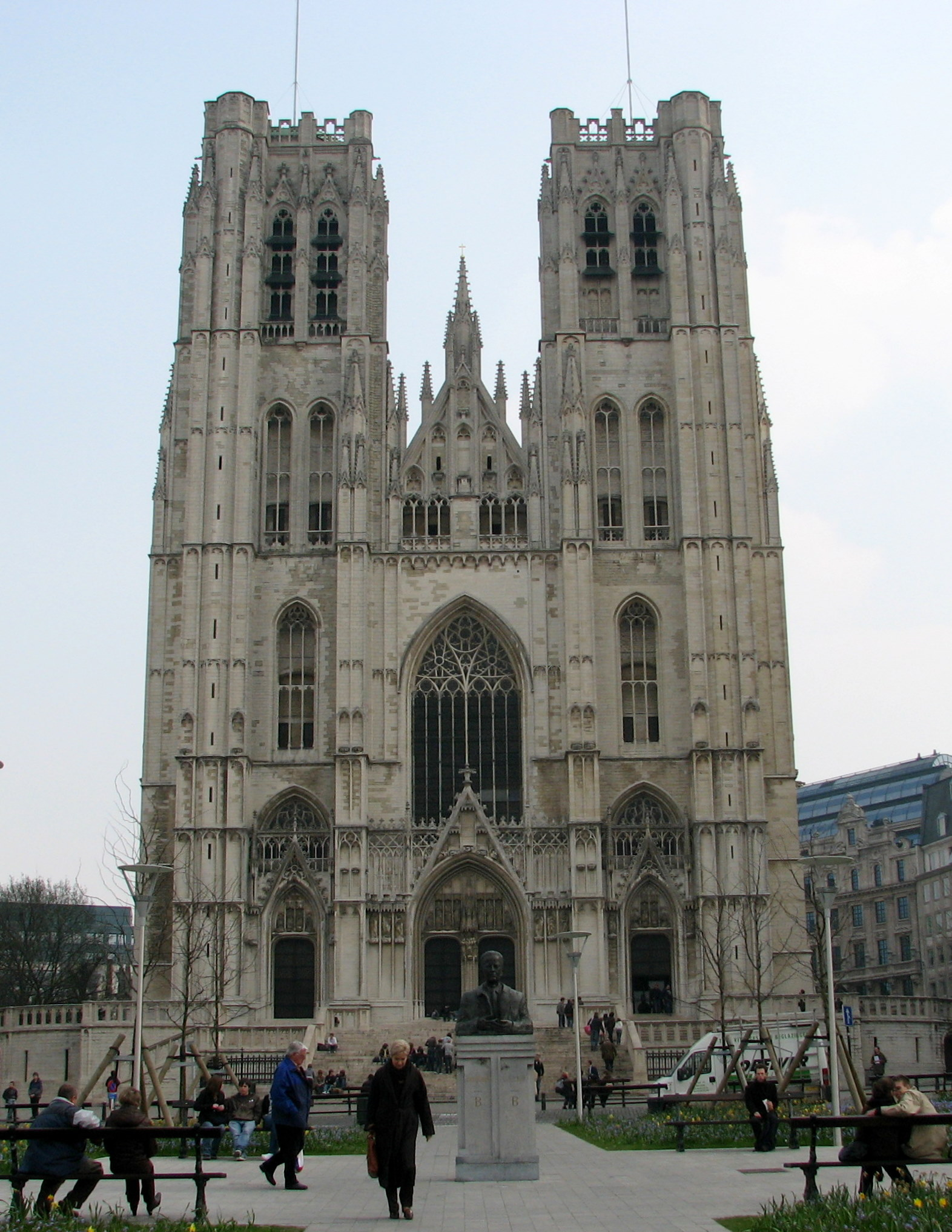 Brussel St. Michael and Gudula Cathedral - Kathedraal van Sint-Michiel en Sint-Goedele